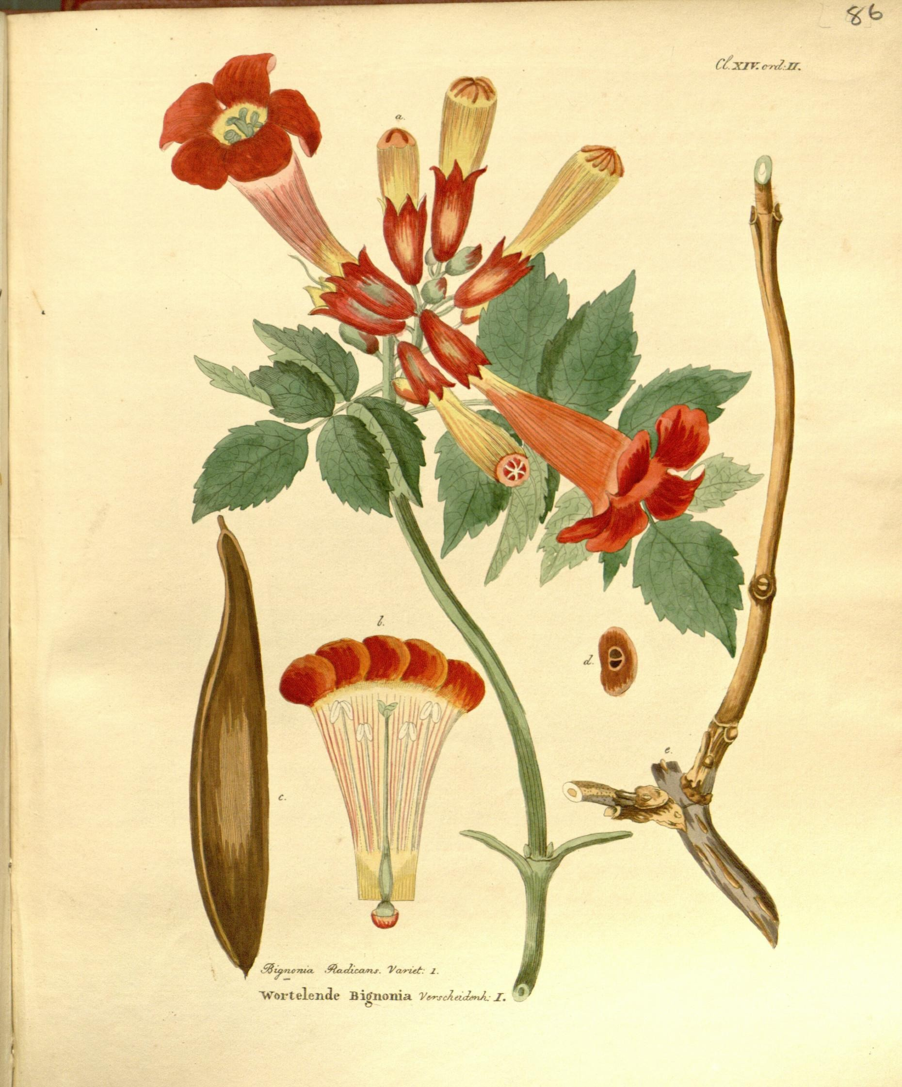 Wortelende Bignonia